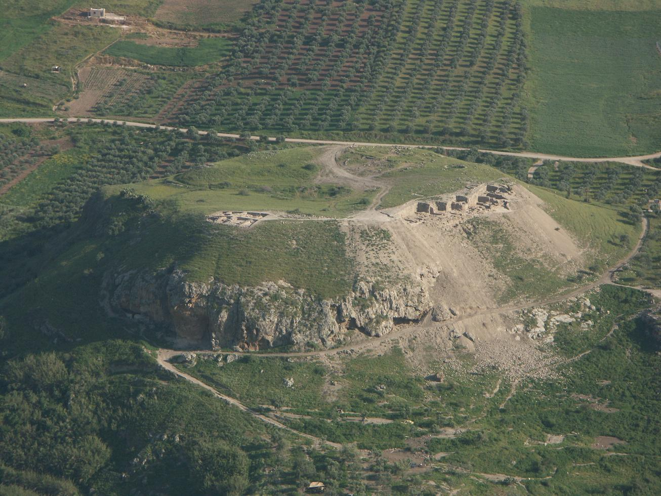 Ausgrabungen im Sommer 2007 am Tall Zira´a - Ausgrabung des BAI Wuppertal und DEI Jerusalem+Amman; und